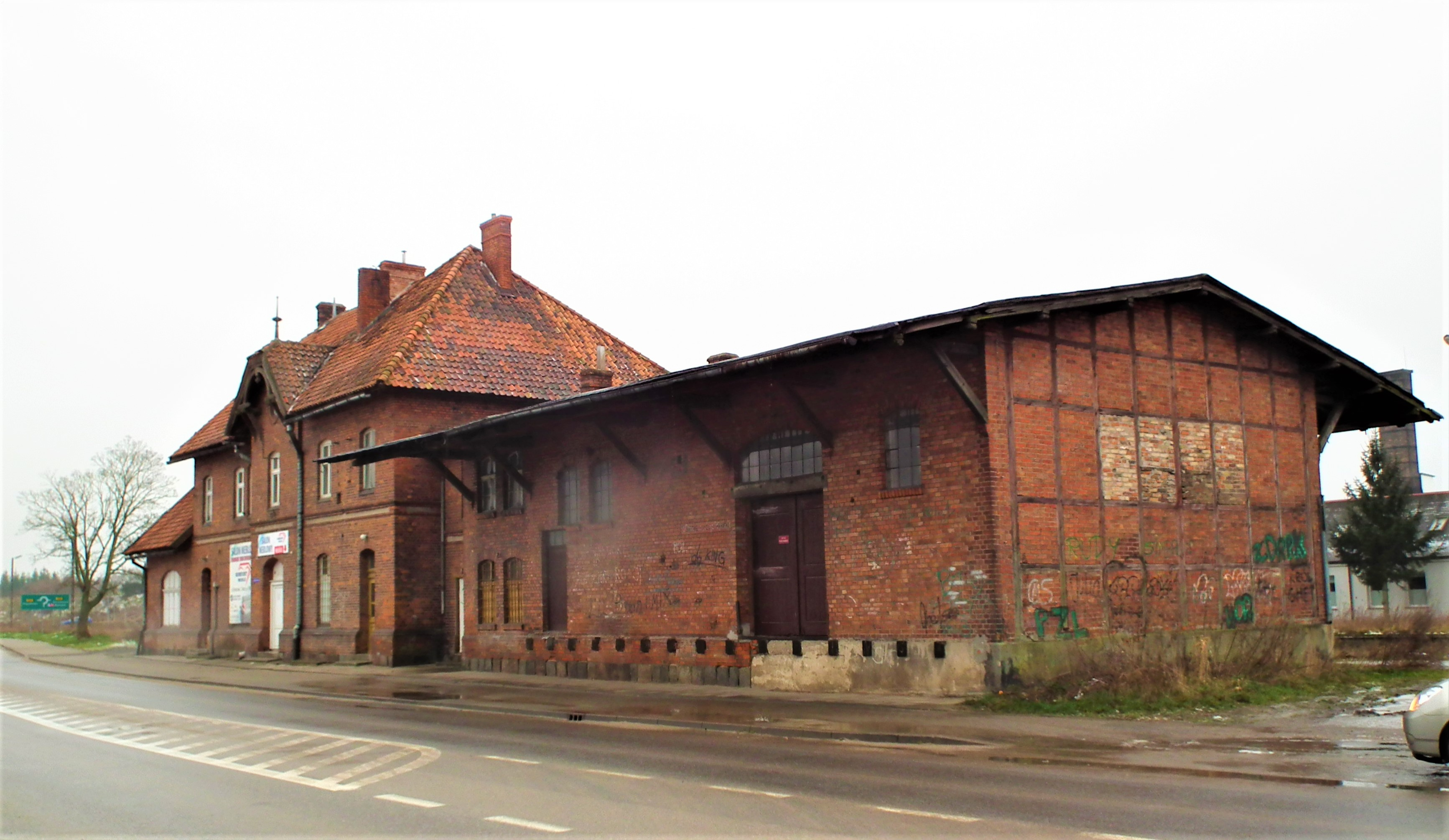 Dworzec kolejowy w Skórczu.